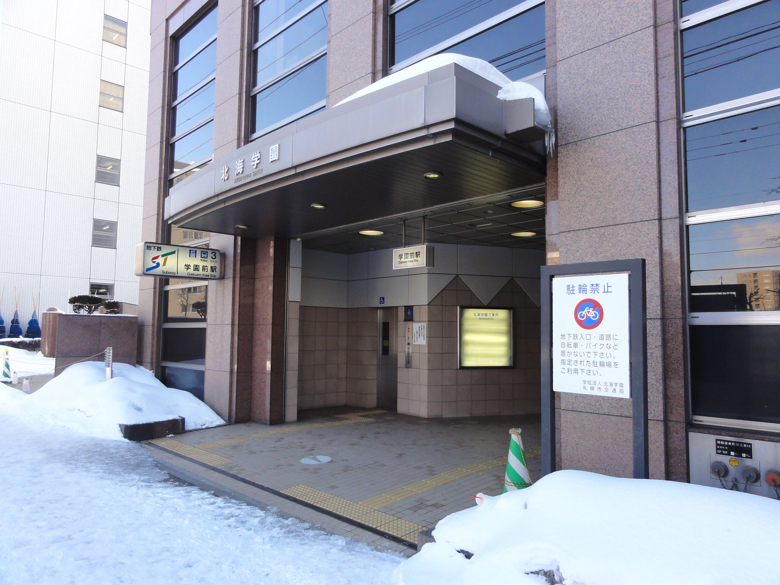 学園前駅 (北海道)3番出口・北海学園玄関